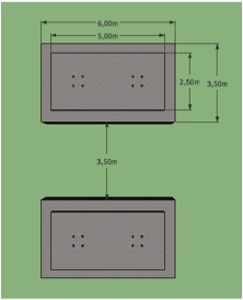 vue de dessus+cotations